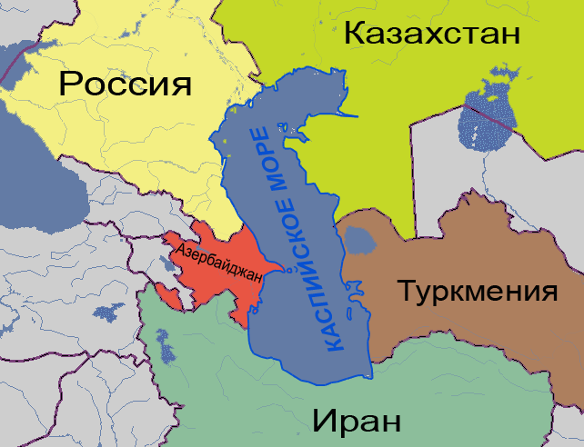 Государства, имеющие выход к Каспийскому морю